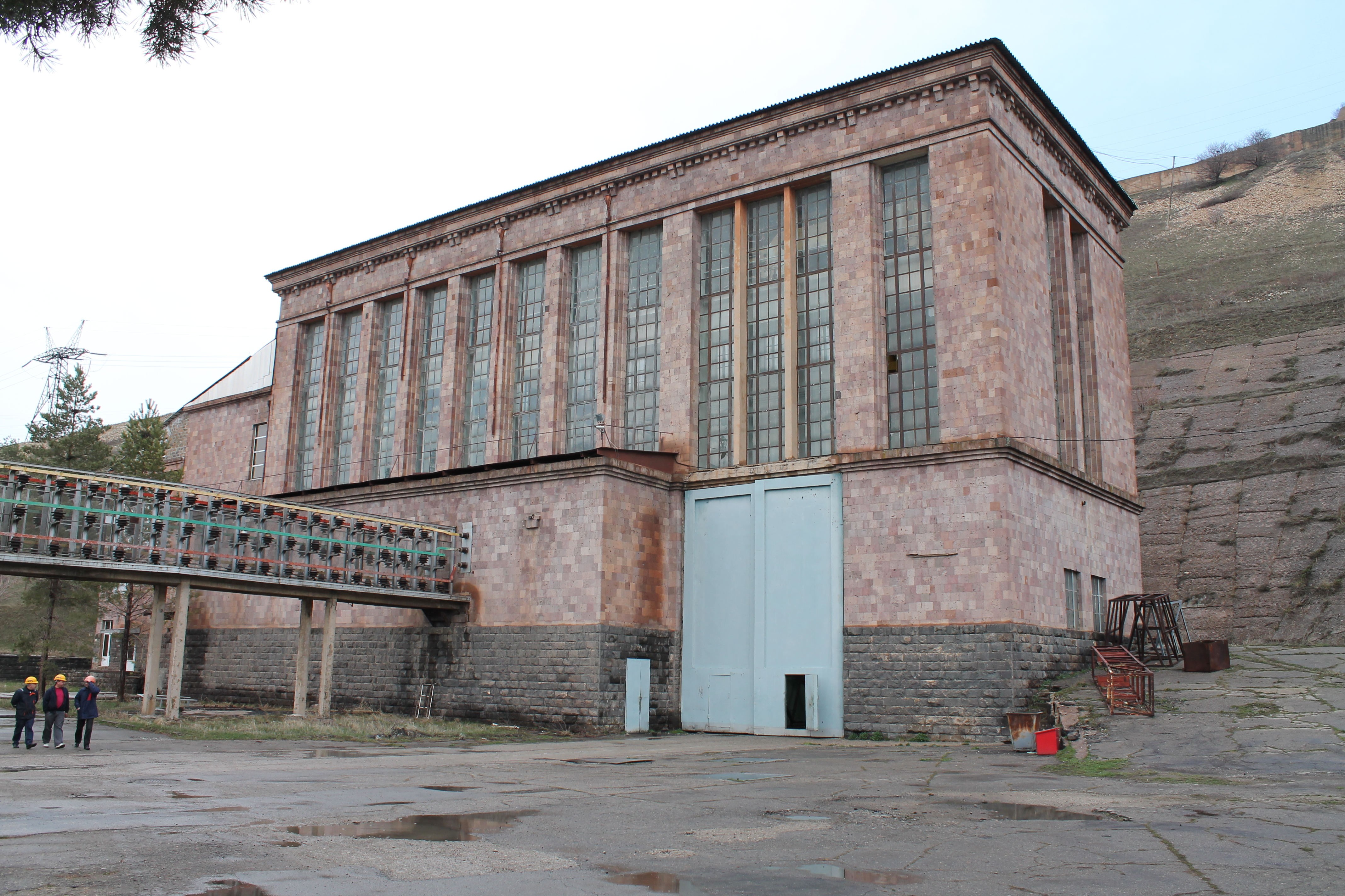 Здание Разданской ГЭС